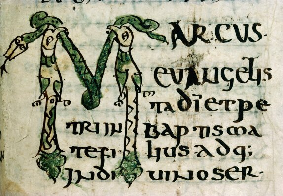 Début de l'Evangile selon Saint Marc: la Prédication de Jean-Baptiste. Initiale M. F° 59. Autun, Bibliothèque Municipale. Ms 3.